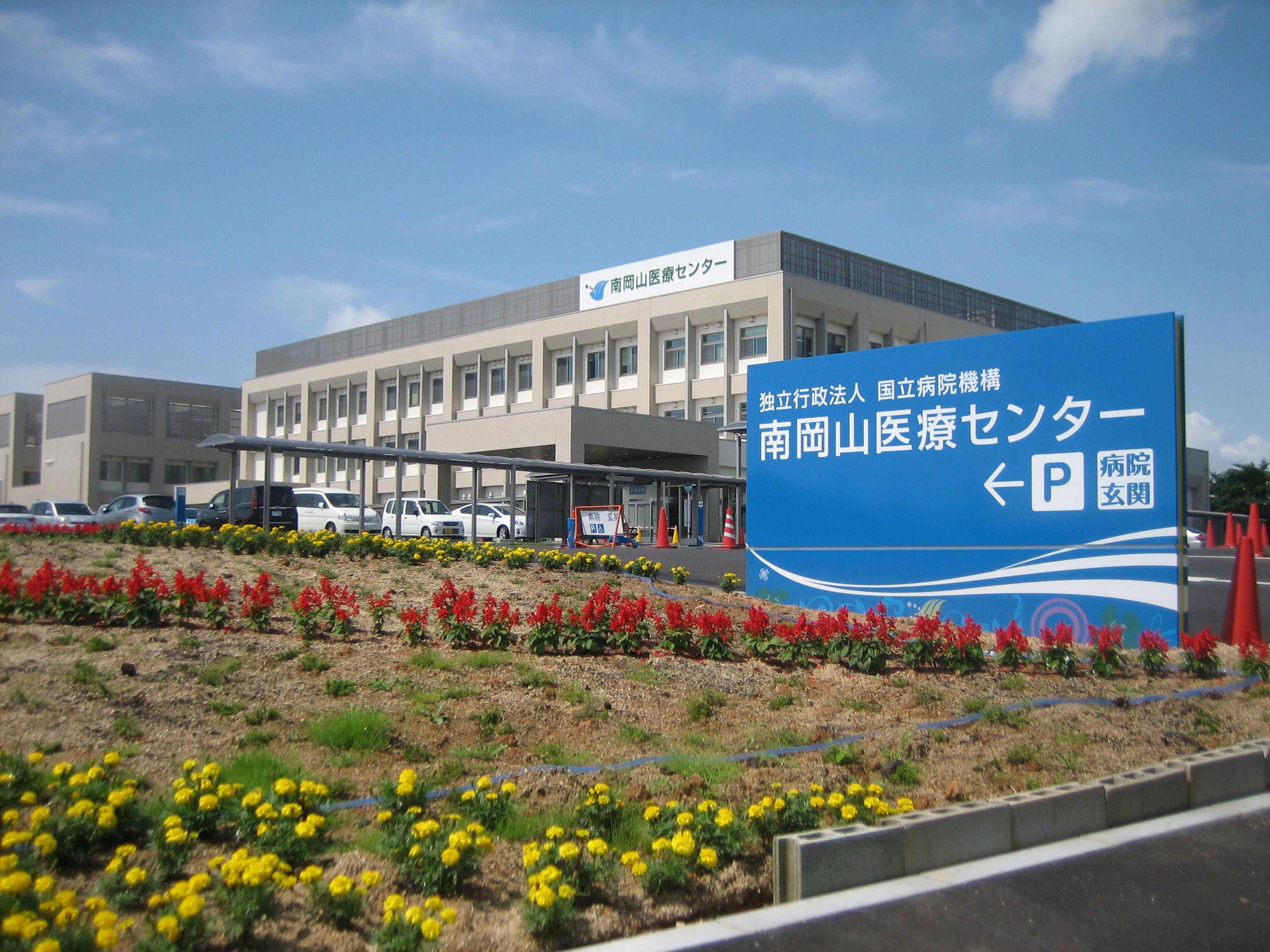 南岡山外観